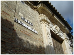 Entrada Museo Municipal